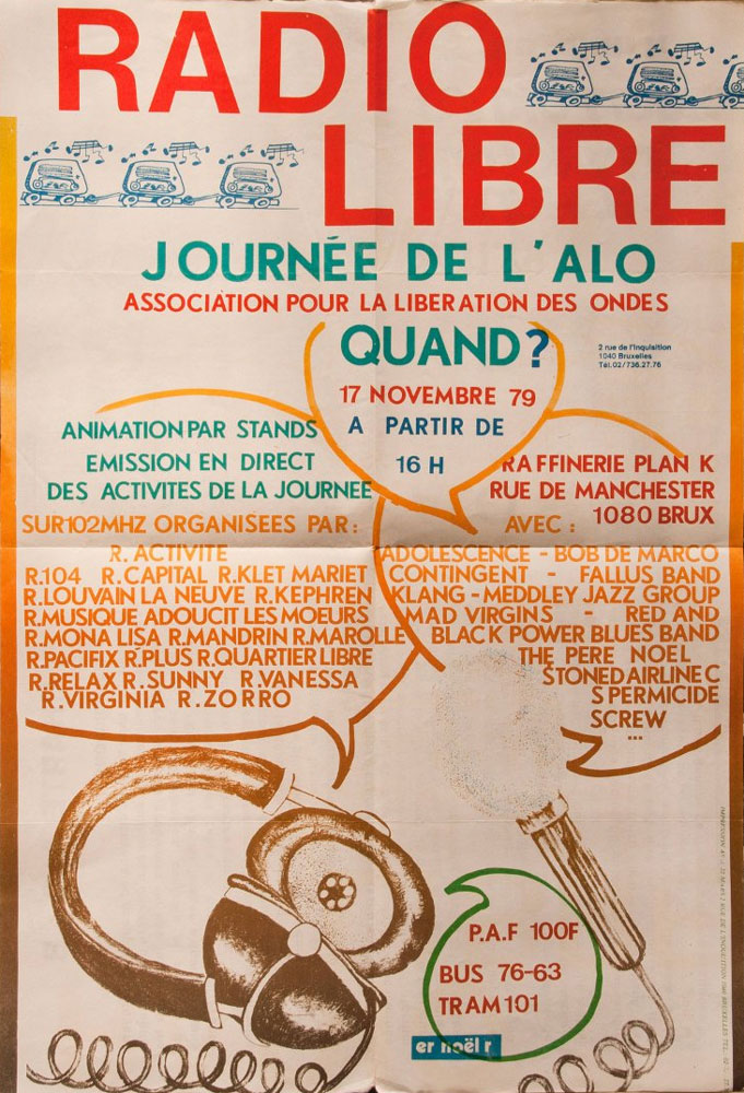 Radios libres en Belgique - Association pour la Libération des Ondes (Belgique) - Fête des radios ibre 17 novembre 1979